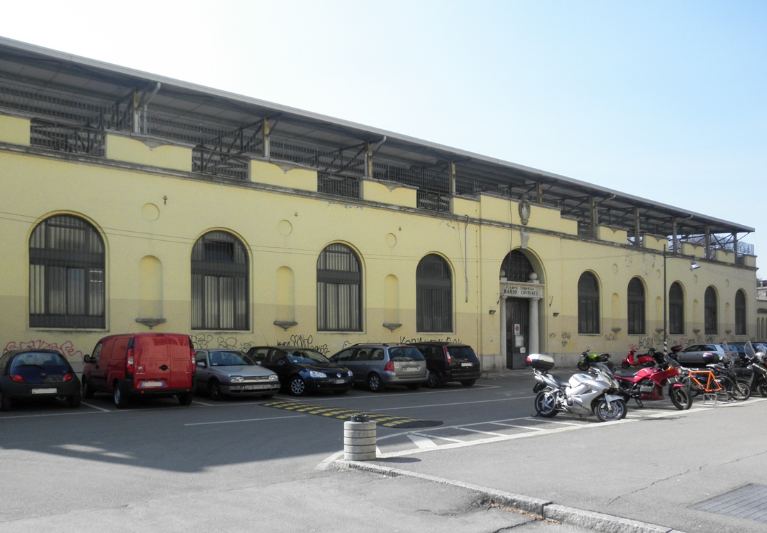 Il campo sportivo Giuriati a Milano, in via Carlo Pascal 6.